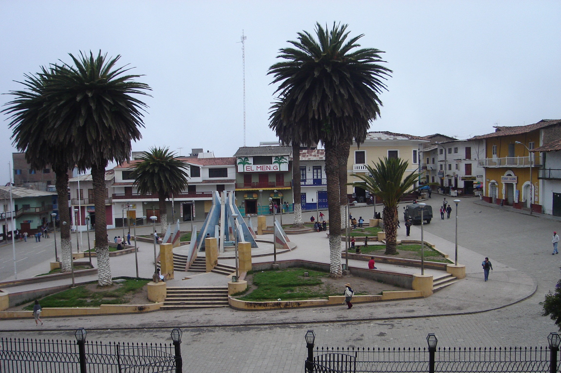 Vista General de la Plaza de Armas de Otuzco